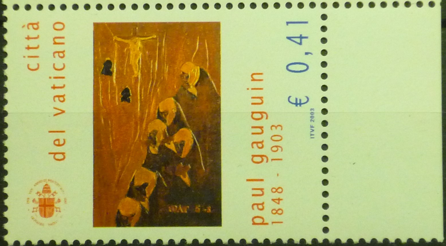 Mattäus 5.8, Selig, die ein reines Gewissen haben, 1892, Vaticanische Museen Rom